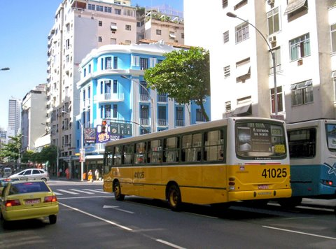 Vista da Avenida Nossa Senhora de Copacabana, Rio de Janeiro, Brasil. Esta foto foi tirada para ser incorporada ao site e disponibilizada ao público sem restrições.